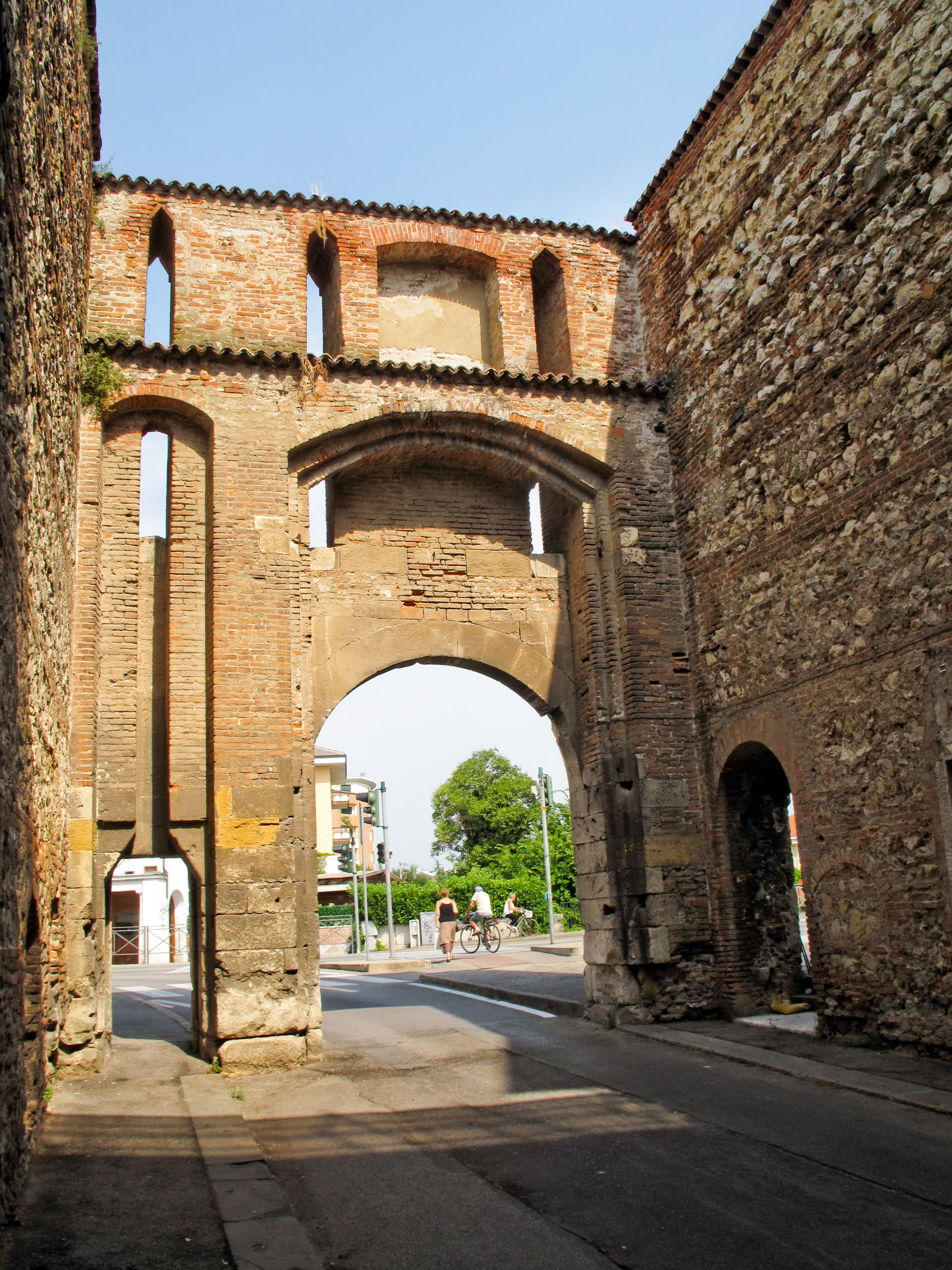 Vicenza - Porta Santa Croce